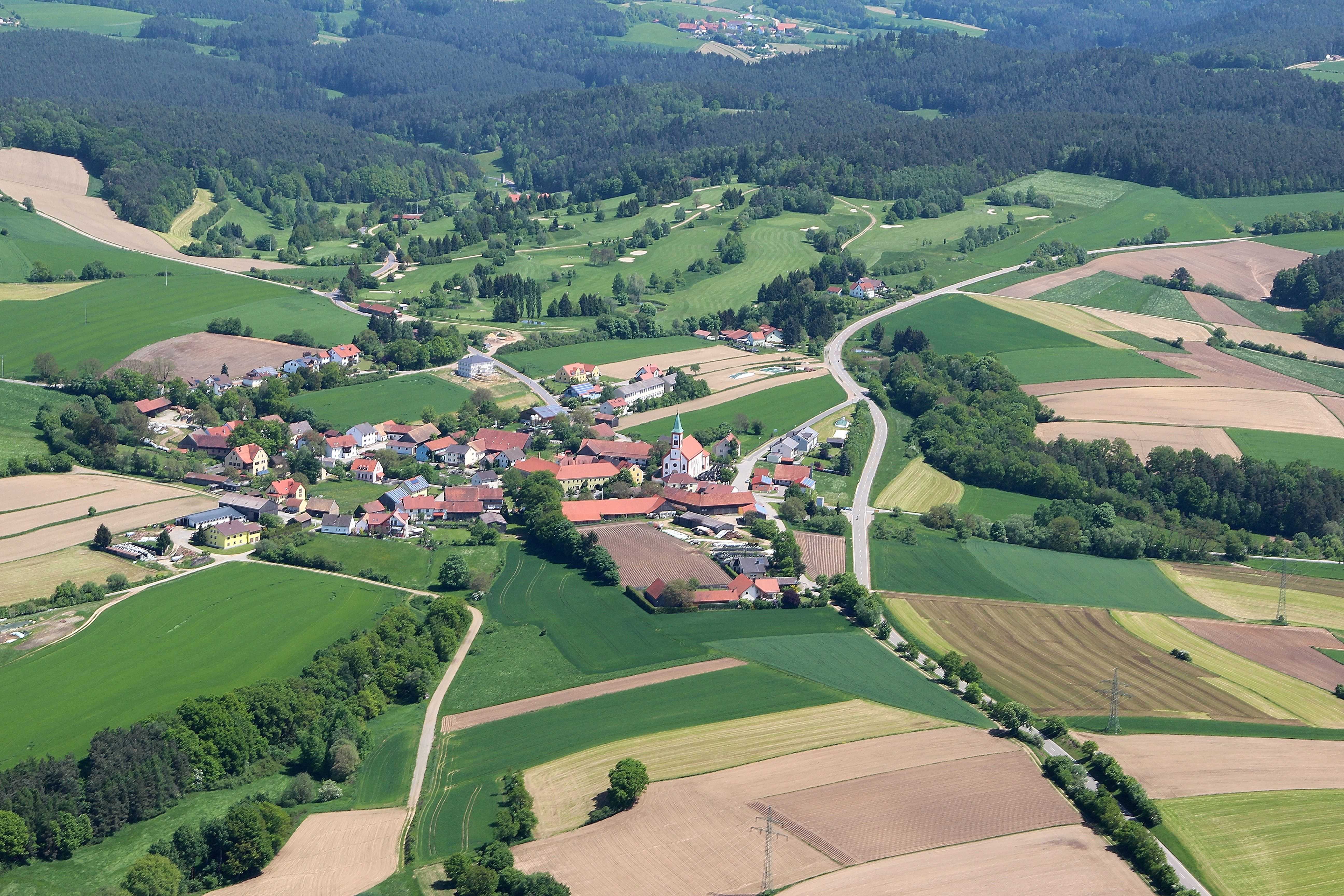 Kemnath bei Fuhrn, Golfplatz Ödengrub (Bildmitte), Höfen (am oberen Bildrand), Stadt Neunburg v. Wald, Landkreis Schwandorf, Oberpfalz, Bayern